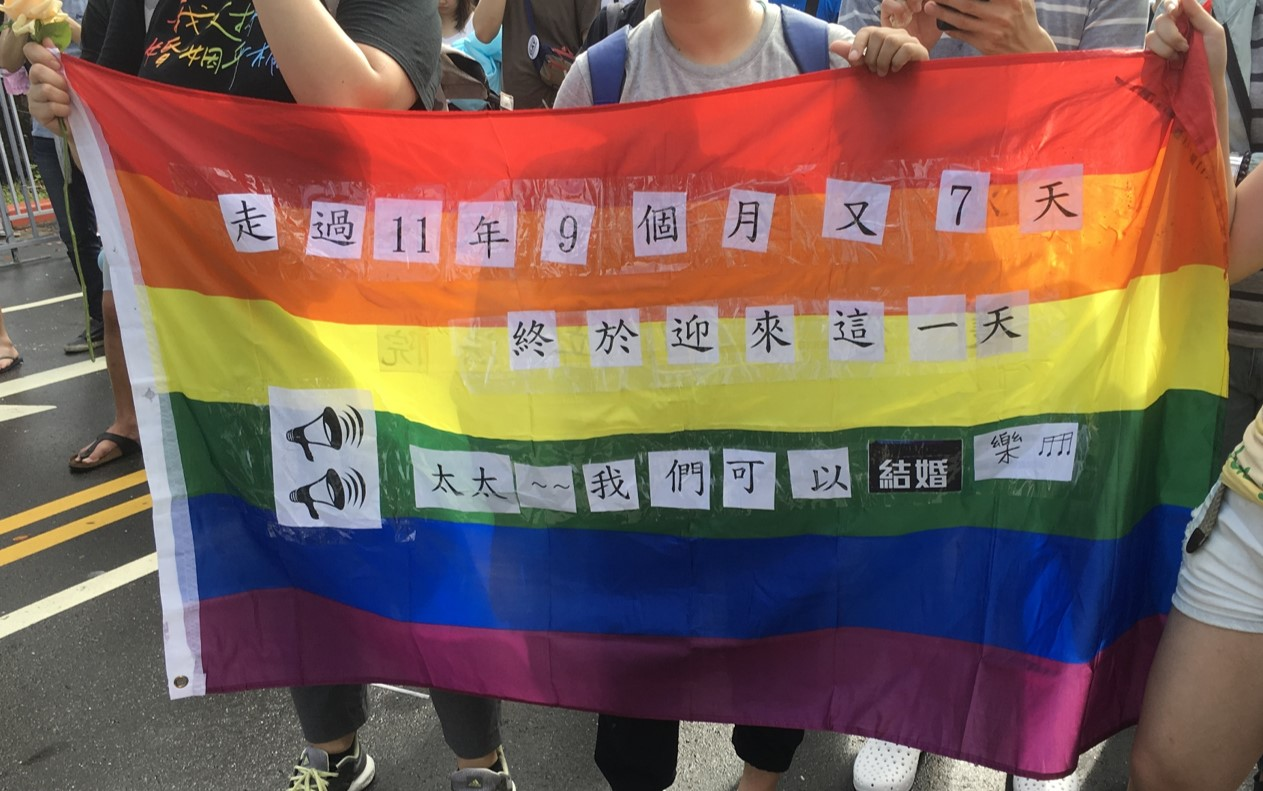 台灣同性婚姻法案通過